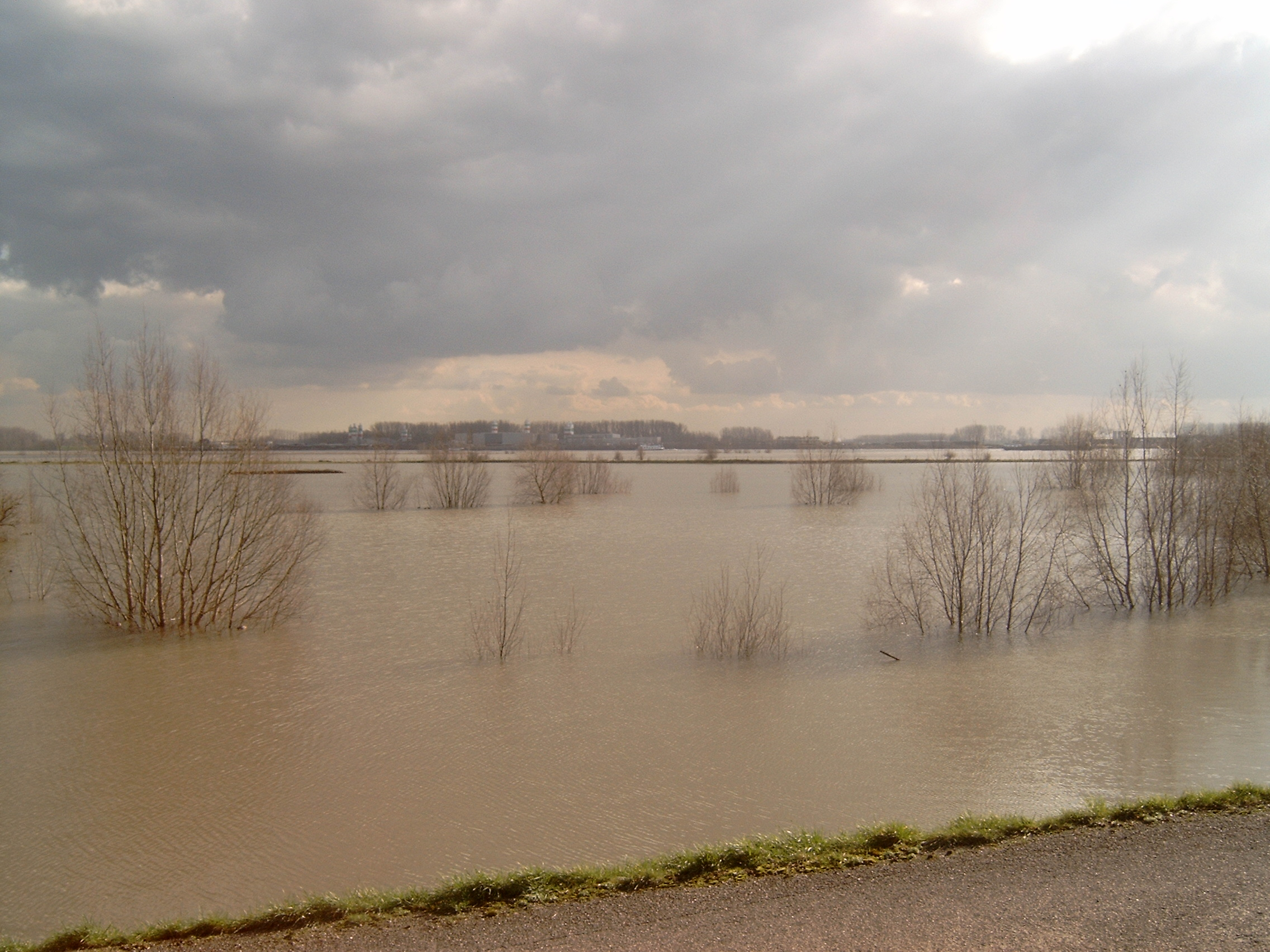 de Waal bij Ochten